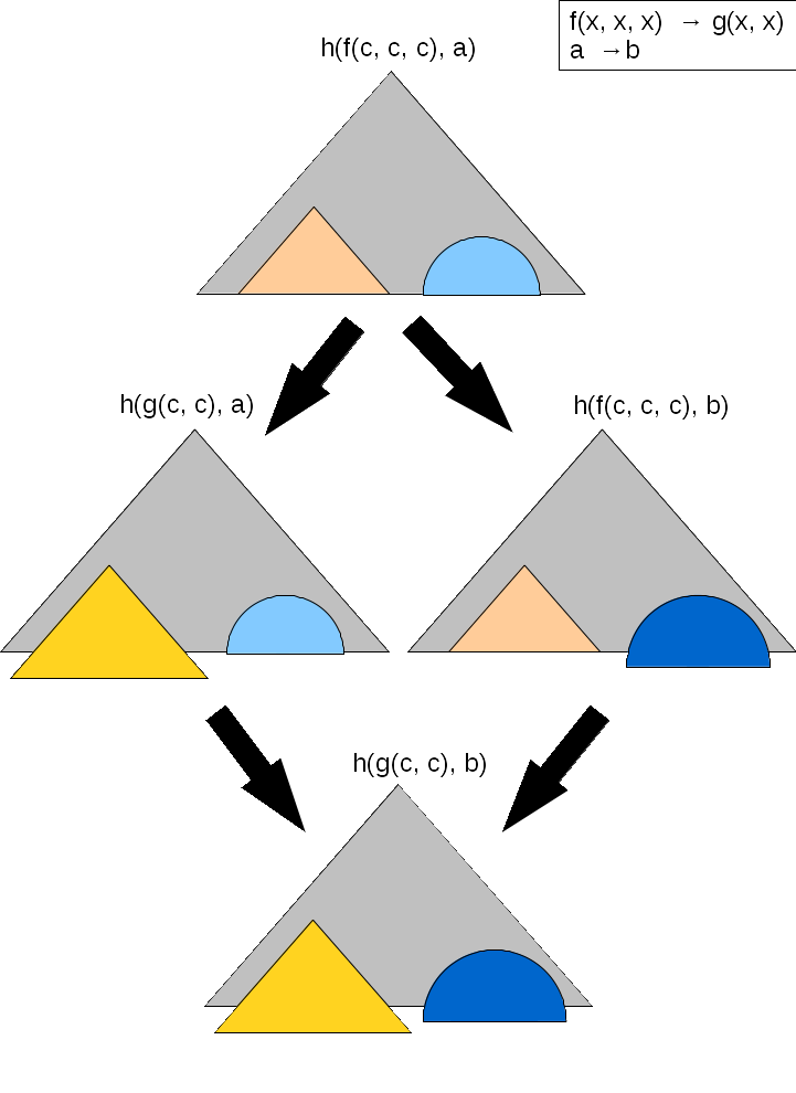 Le schéma montre un exemple où on constante confluence locale car on ne réécrit pas au même endroit.